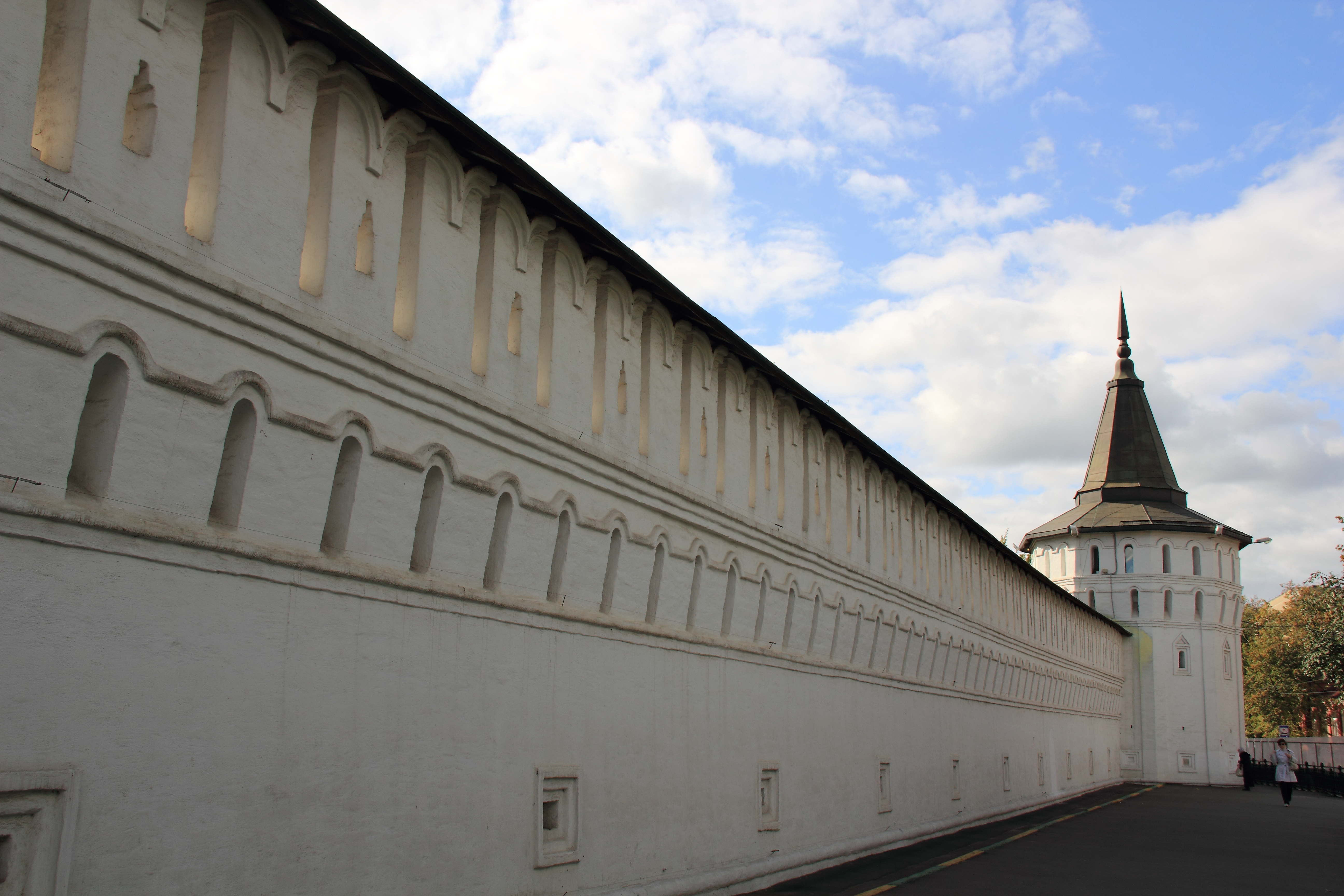 Монастырская стена-1